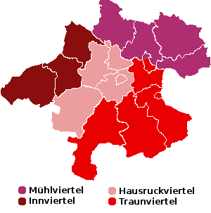 Karte von Oberoesterreich mit eingezeichneten Vierteln und Legende